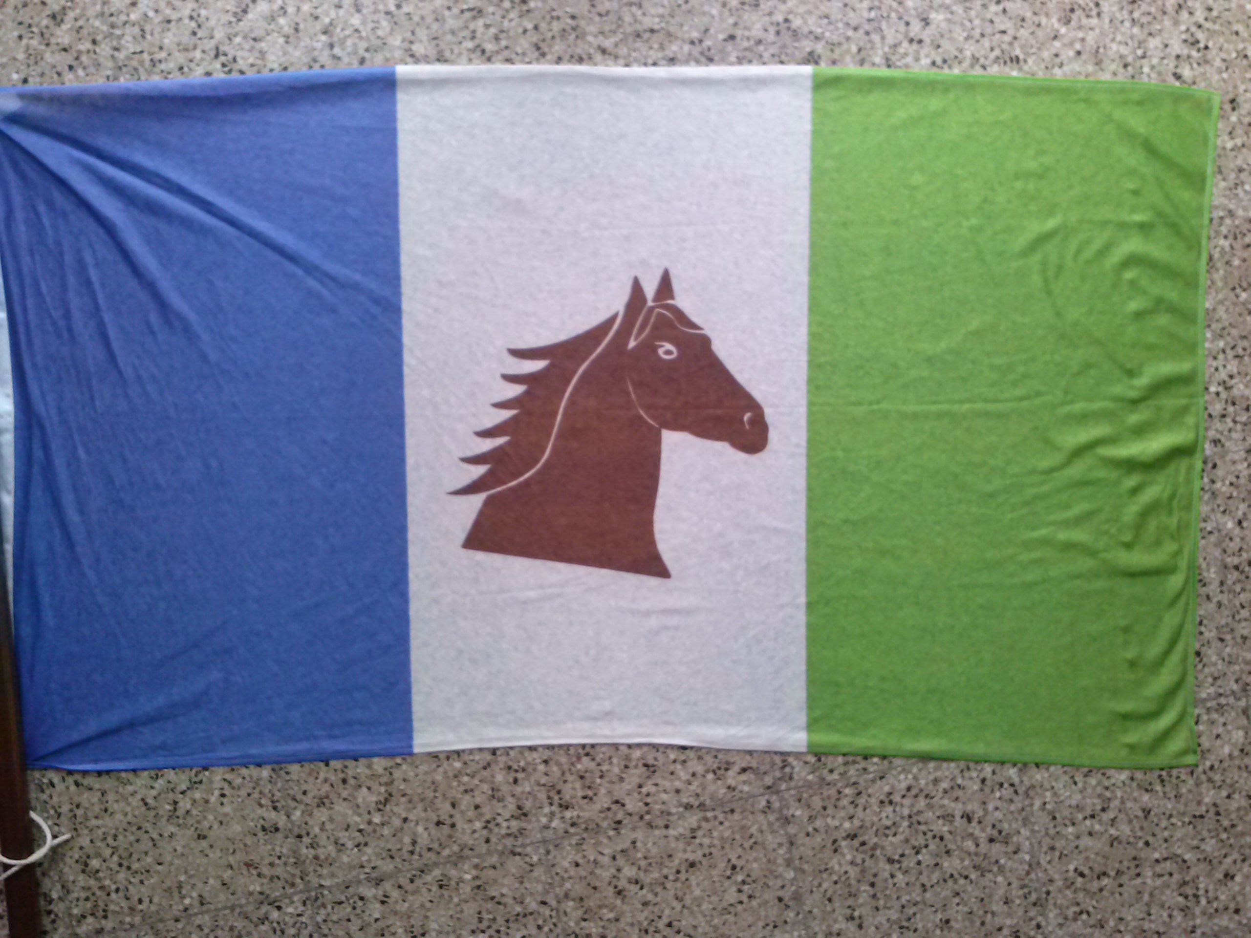 Realizada por Ramses Medina.